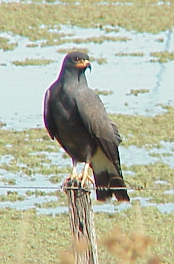 Foto tomada por el autor Fernando Biolé. Rostrhamus sociabilis